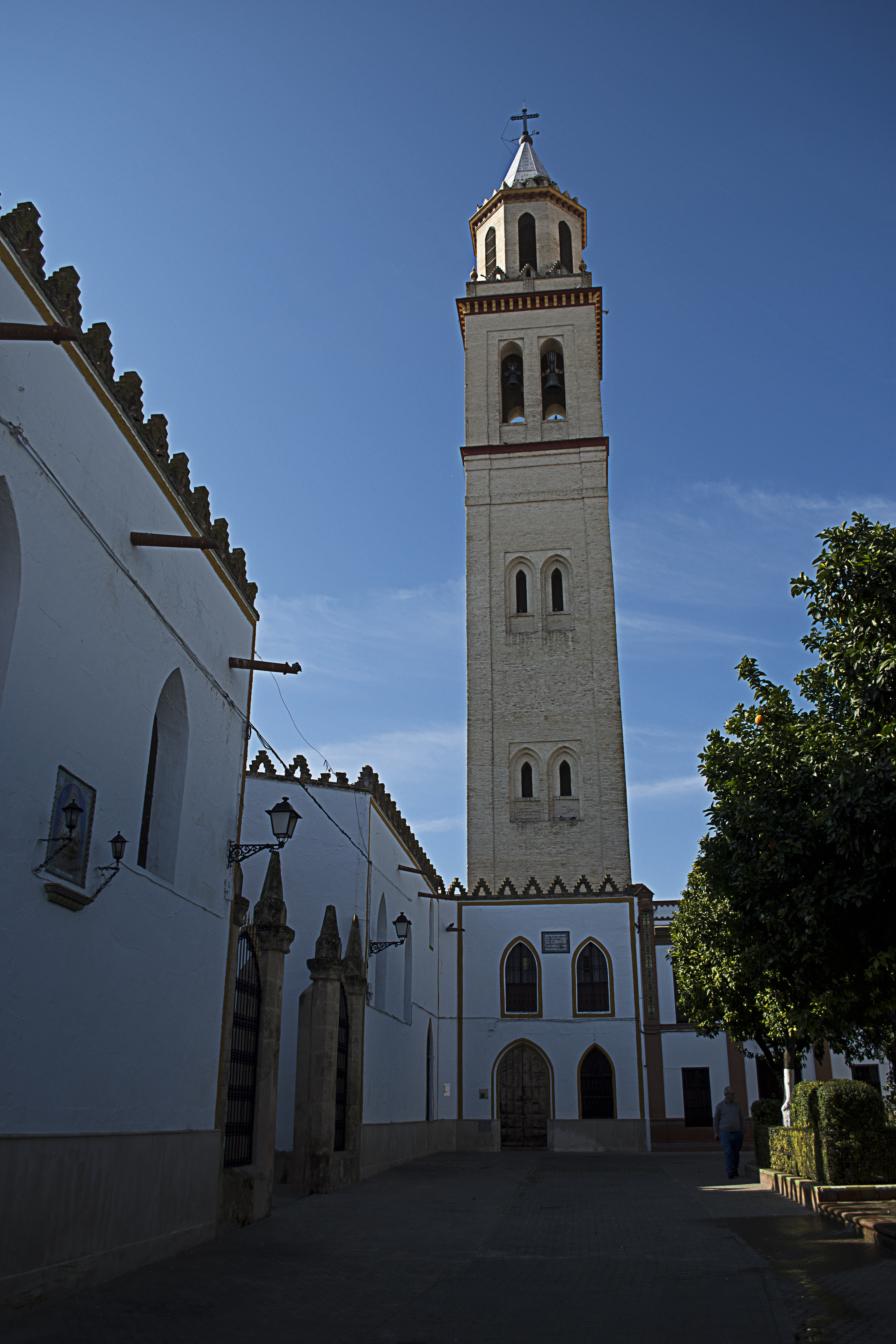 Iglesia de Nuestra Señora de la Asunción, Lora del Río (España)